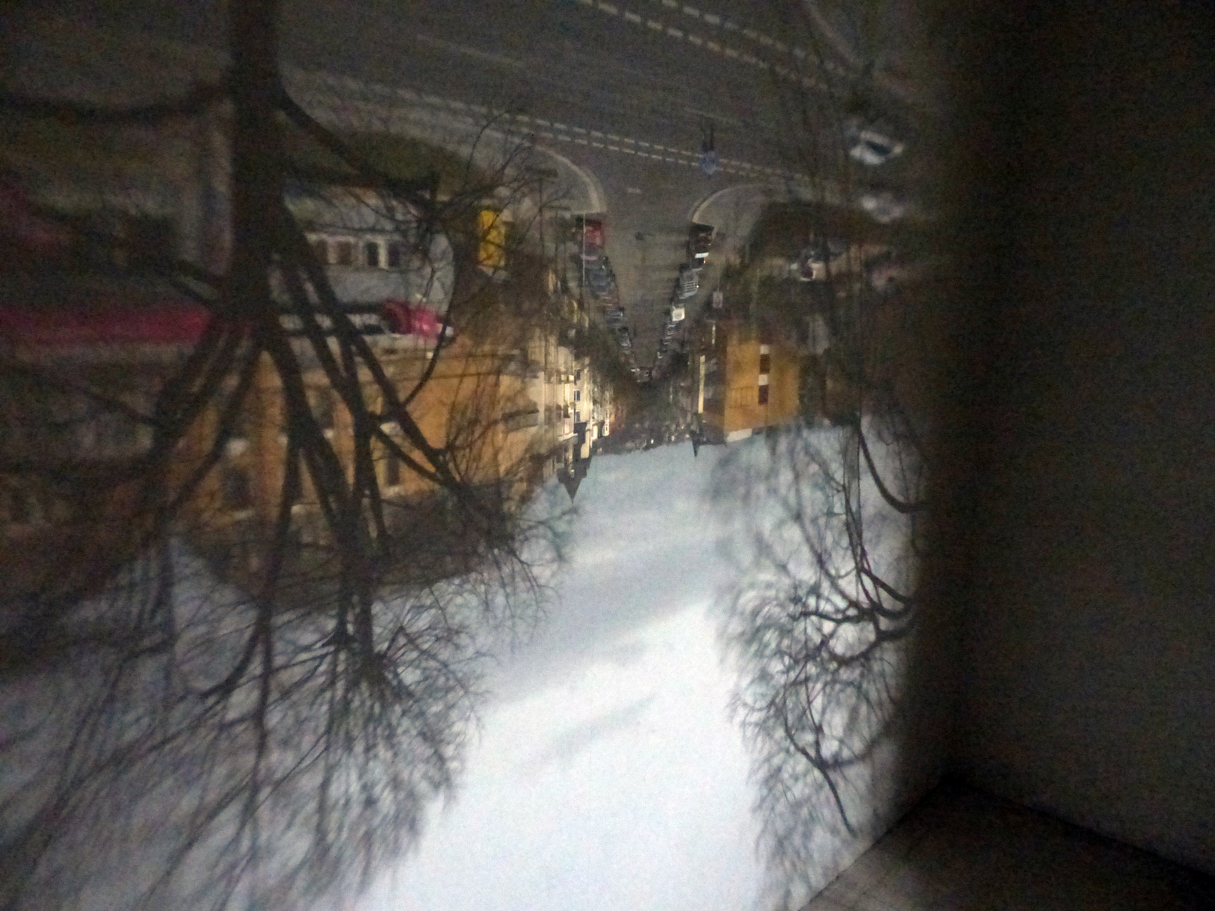 Camera obscura im Straßenübergang zwischen den Gebäudeteilen der ehem. Ernemann-Werke in Dresden, heute Technische Sammlungen Dresden